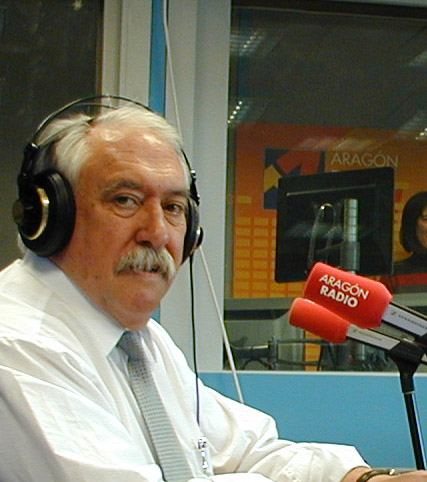 José Ramón Marcuello Calvín, en "Somos" (Aragón Radio)